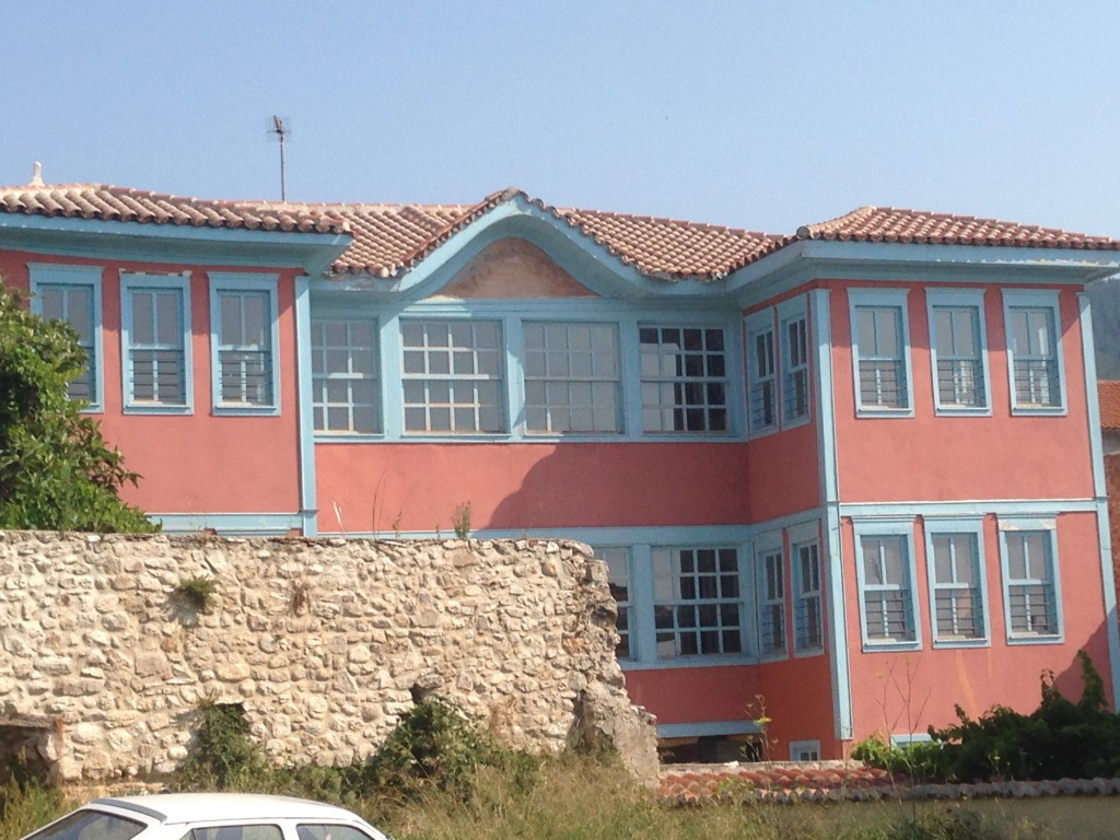 Muzaffer Salihoğlu - Doğup Büyüdüğü Konak